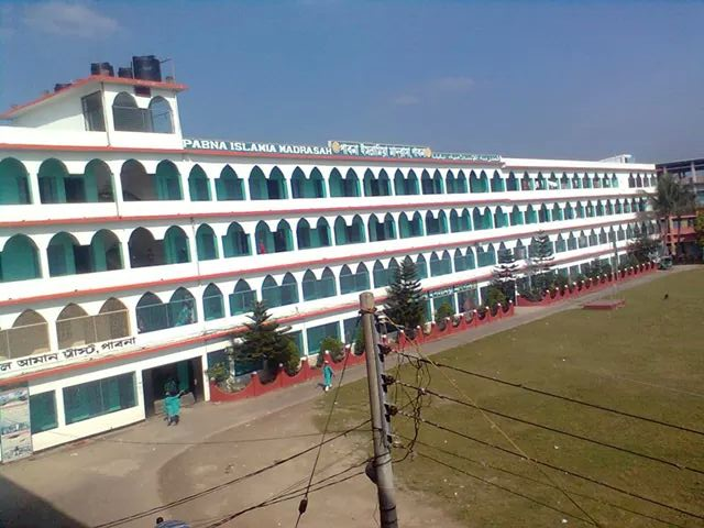 Pabna Islamia Madrasah in Bangladesh.